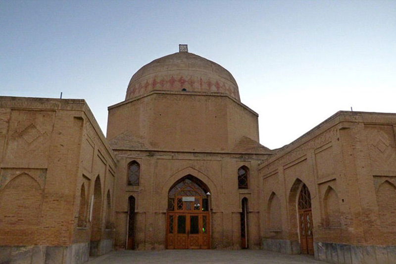 مسجد جامع سلجوقی گلپایگان